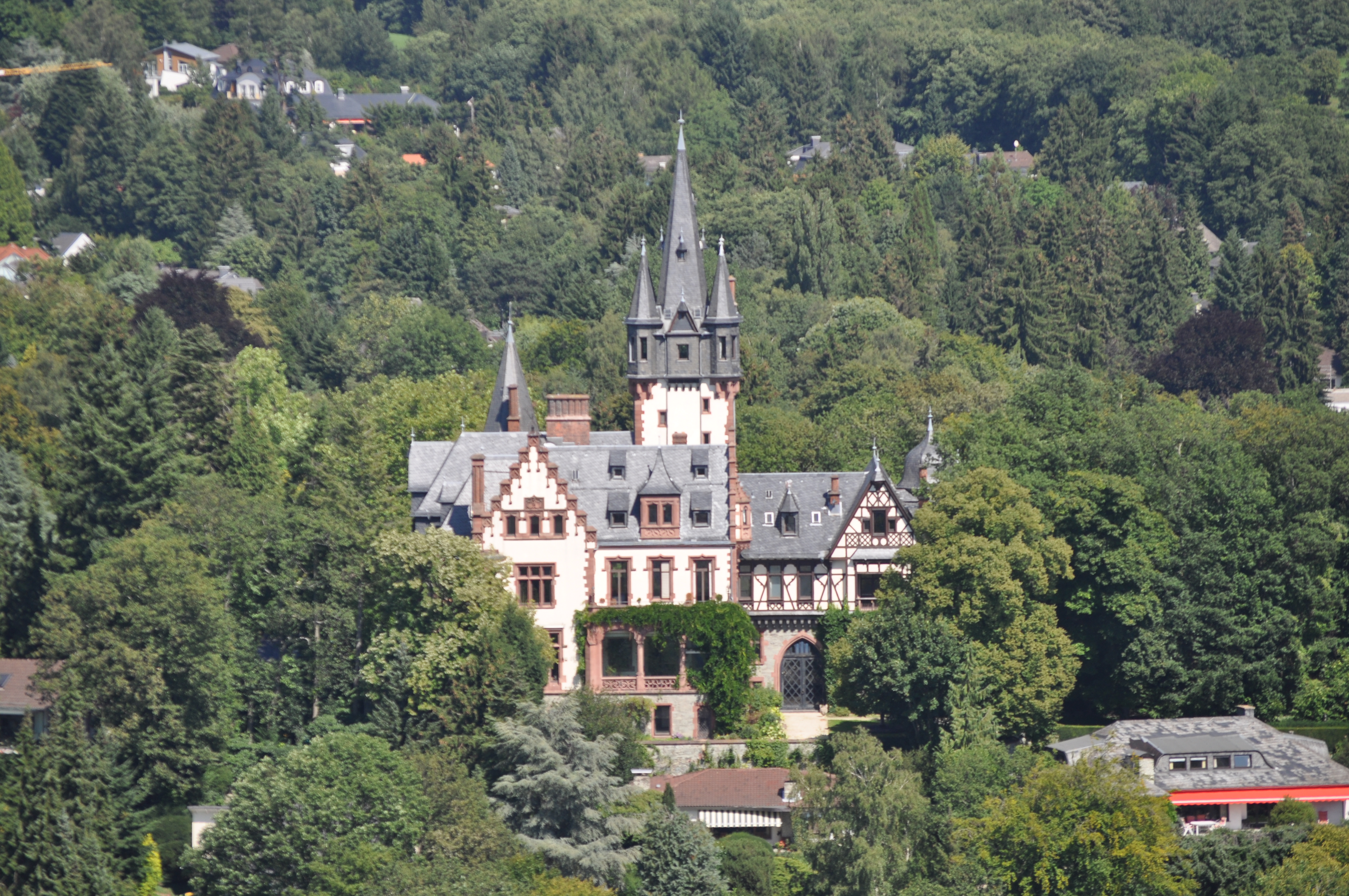 Villa Andreae von der Burg aus gesehen